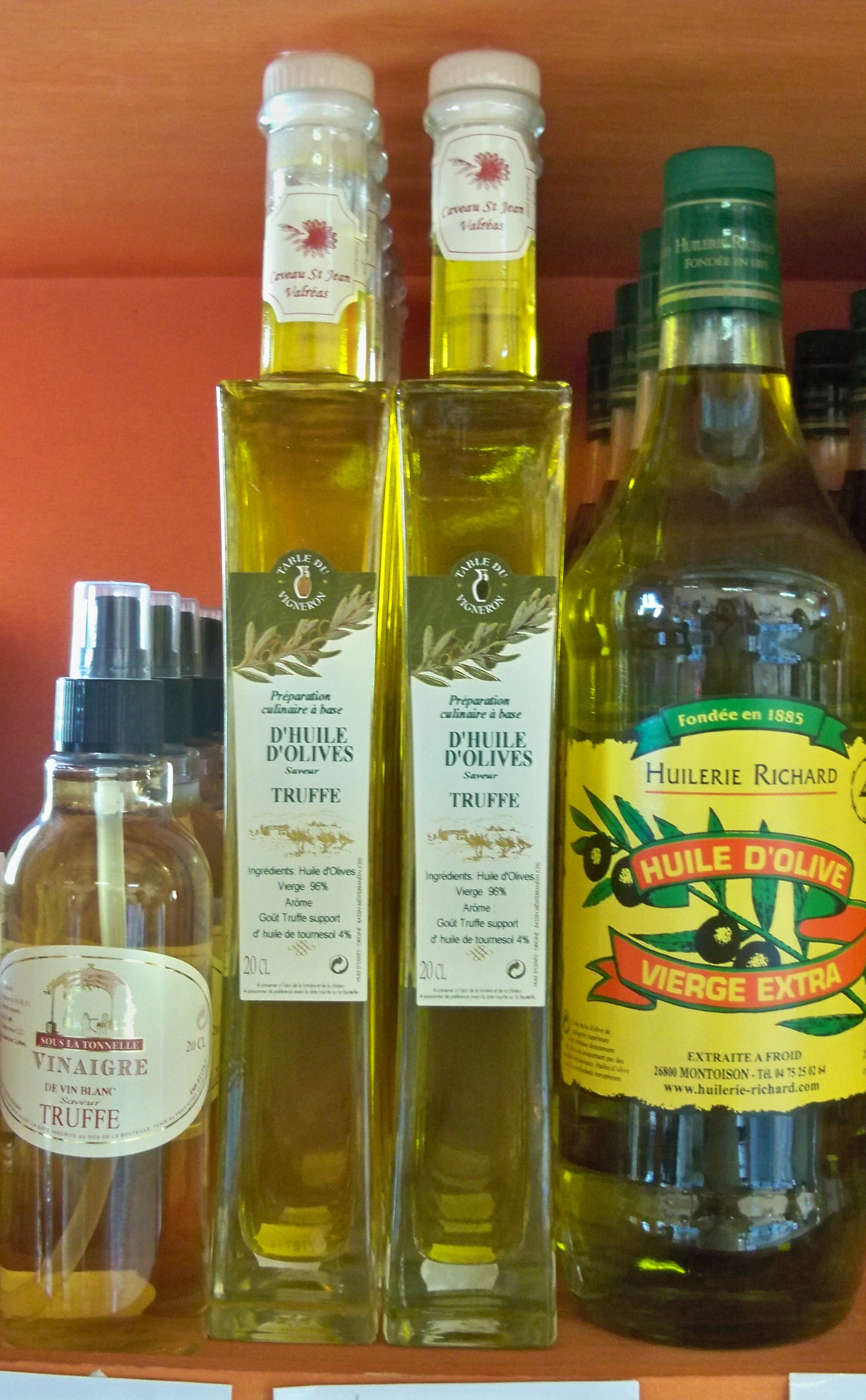 bouteille d'huile d'olive de Nyons